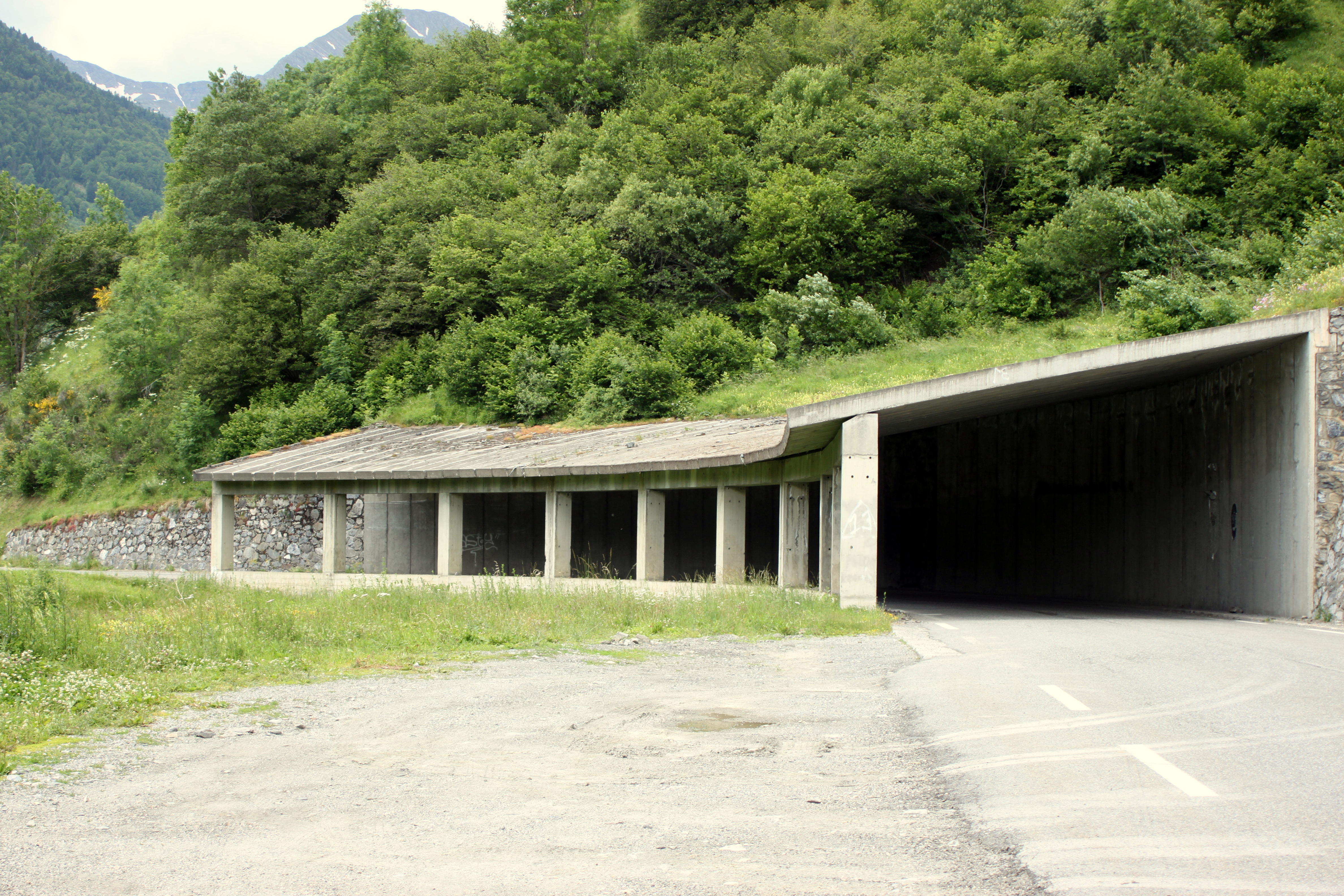 Paravalanche sur la route du Tunnel de Bielsa.